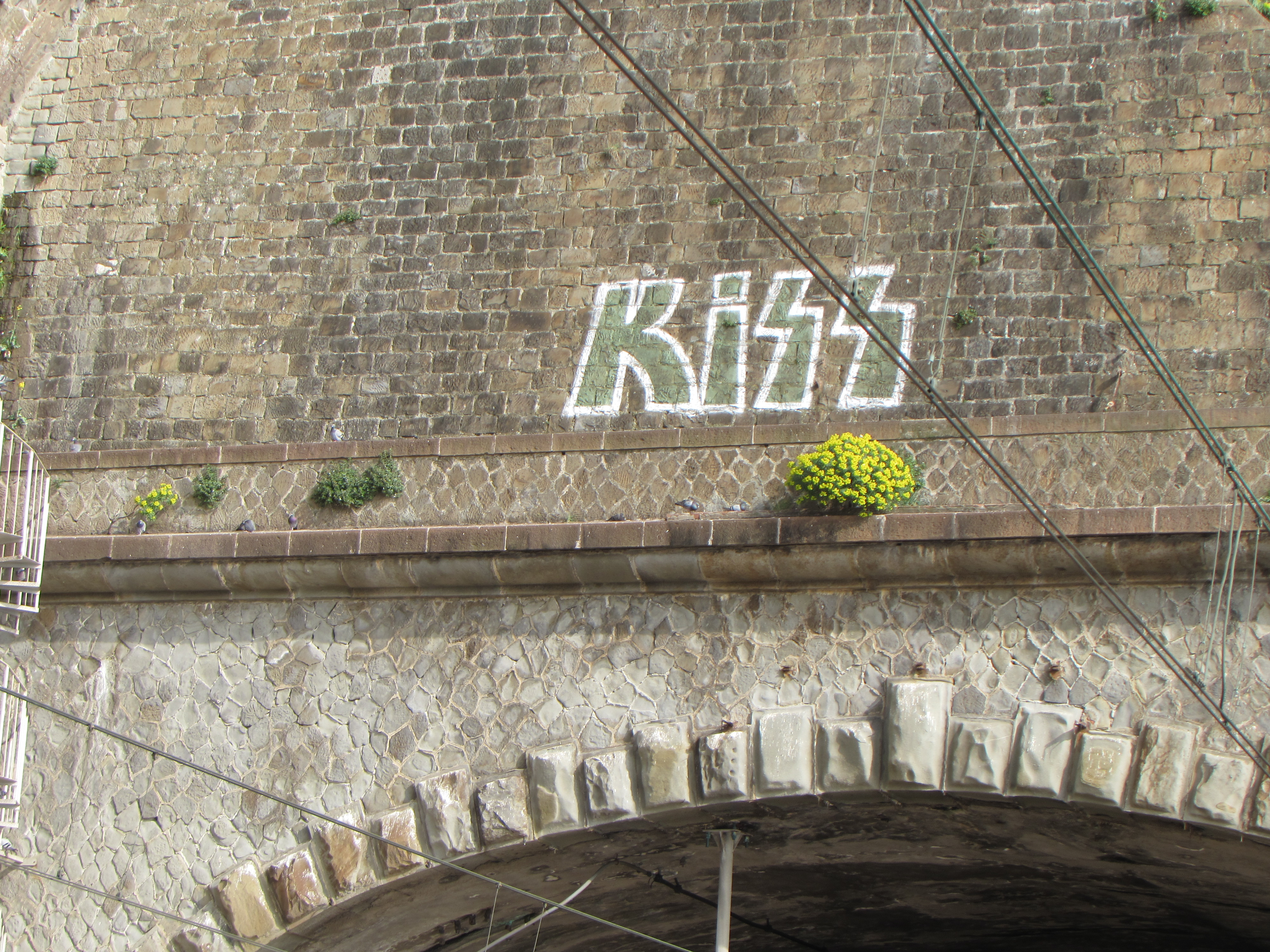 Il logo dei KISS su una galleria ferroviaria in Liguria